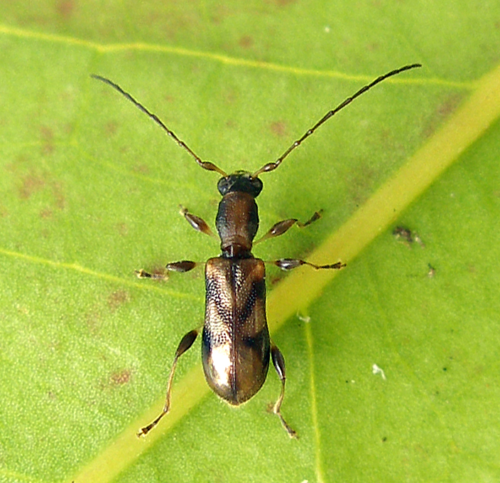 Spathuliger gomyi Villiers, 1970 (Coleoptera, Cerambycidae). Espèce endémique de l'île de La Réunion